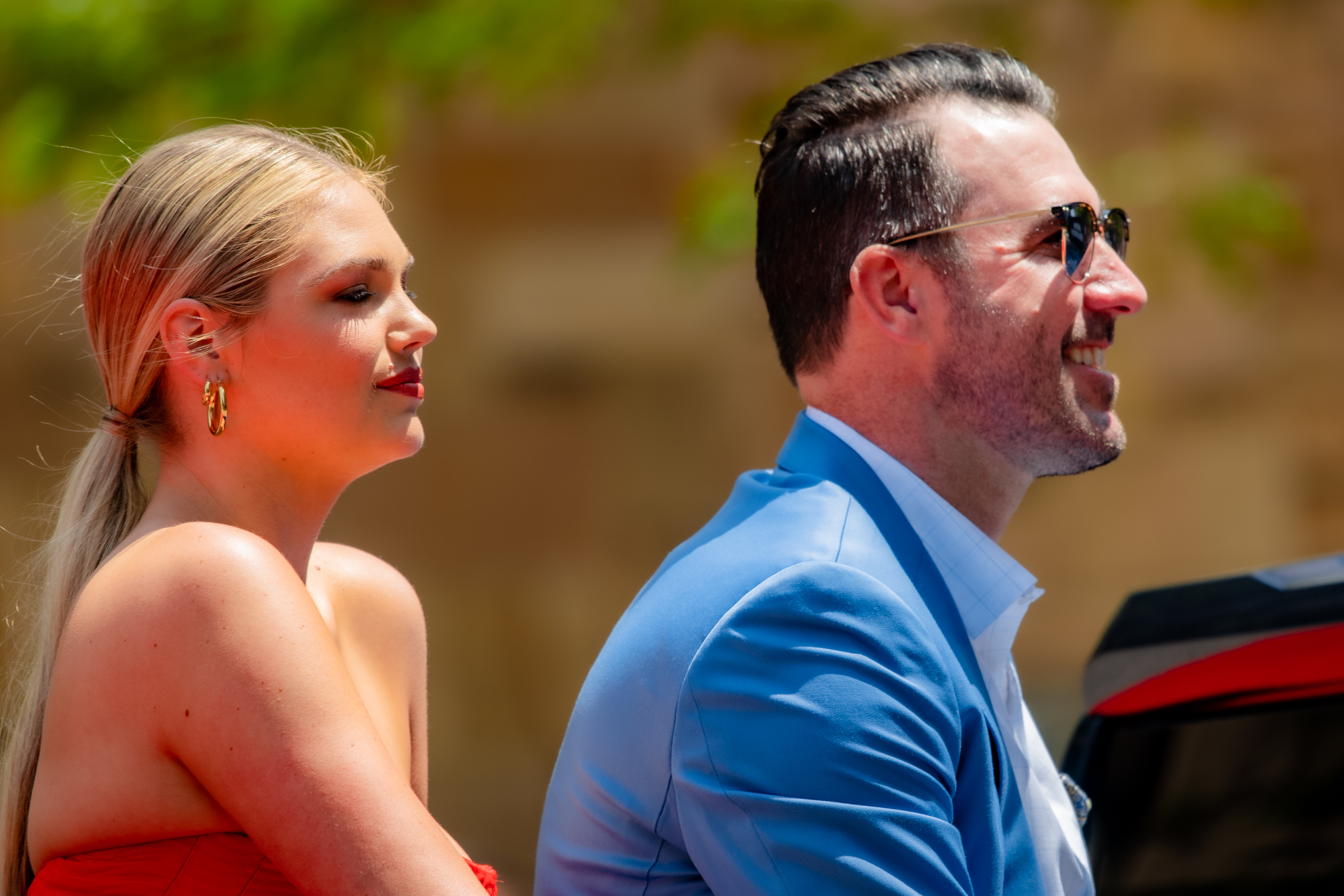 MLB All-Star Red Carpet Parade